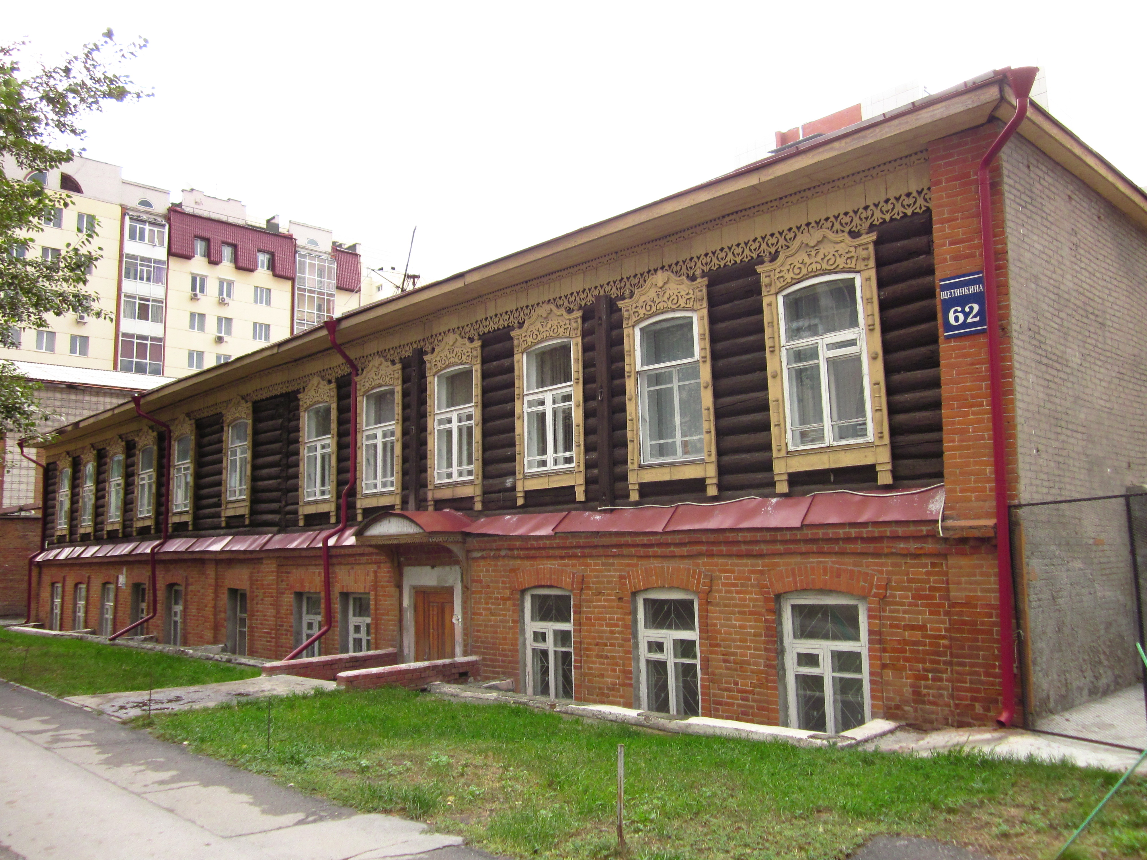 Дом по ул. Щетинкина, 62, Новосибирск